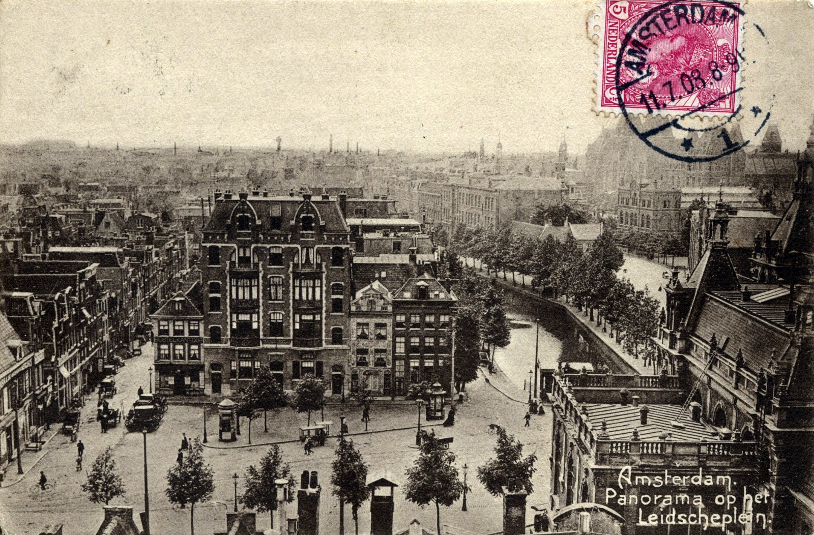 Postcard of Amsterdam